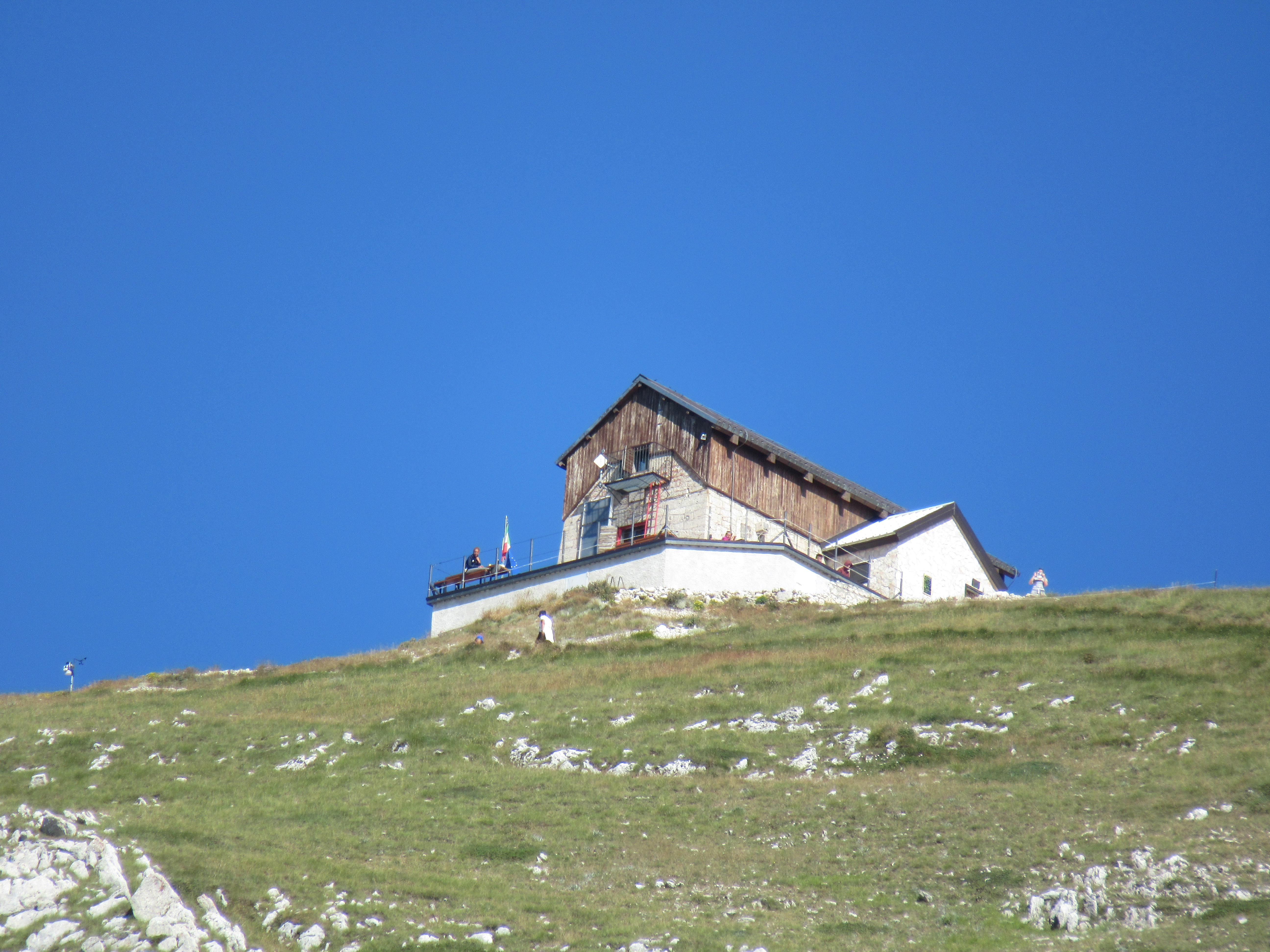 Rifugio Duca degli Abruzzi (Gran Sasso)